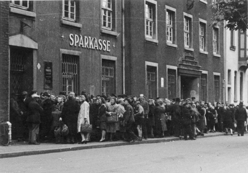 Essen, Währungsreform Währungsreform Juni 1948 Umtauscher vor der Sparkasse [in Essen] 1707-48